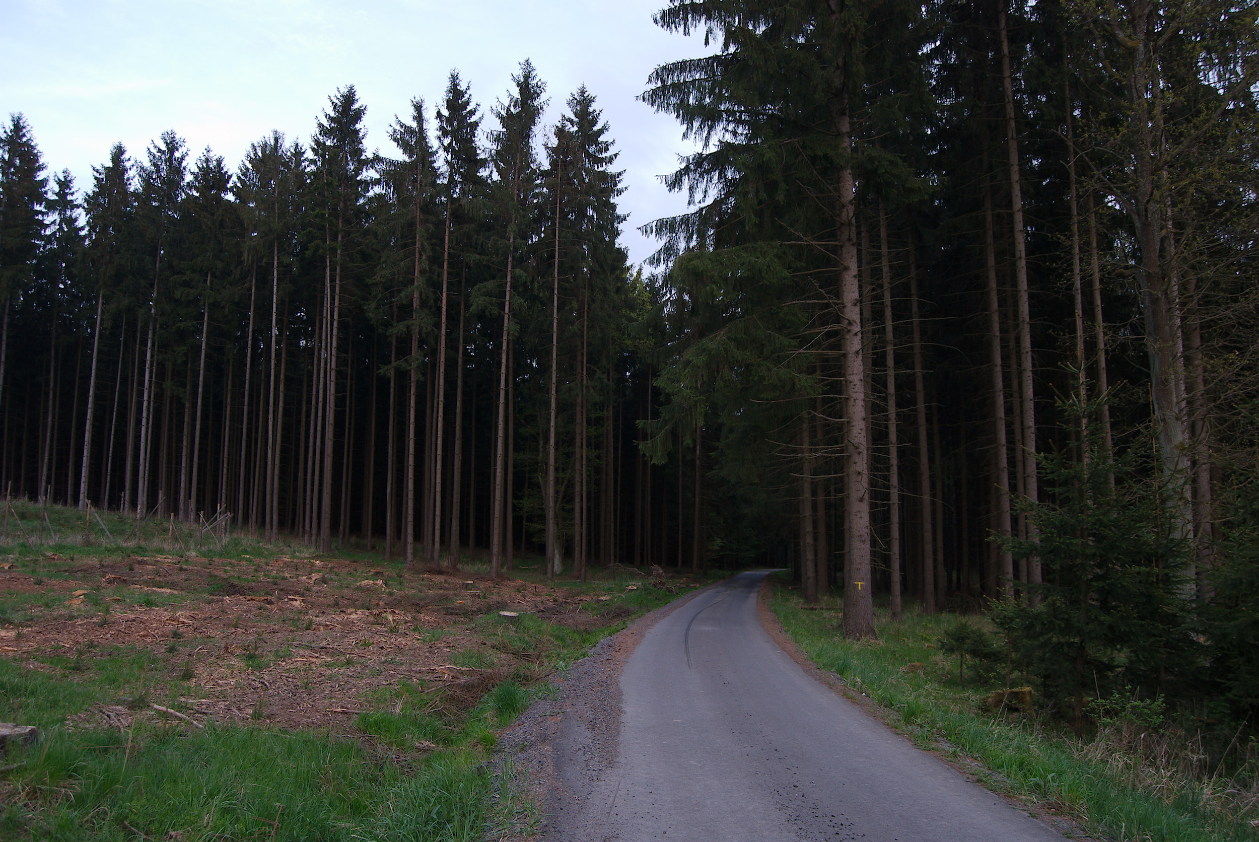 Vojenský újezd Březina - les a vojenská silnice v k. ú. Doubrava u Březiny. Do roku 1977 lokalita náležela ke k. ú. Rychtářov.